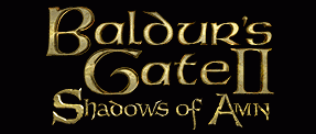 baldurs gate 2 logo